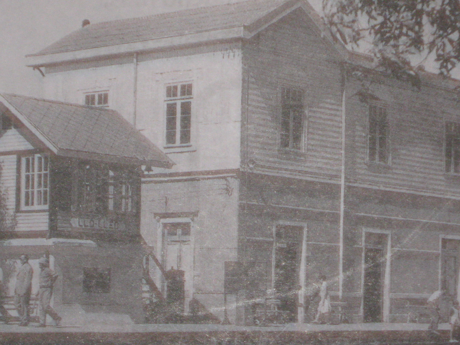 Antigua estación de LLo LLeo, actual centro cultural